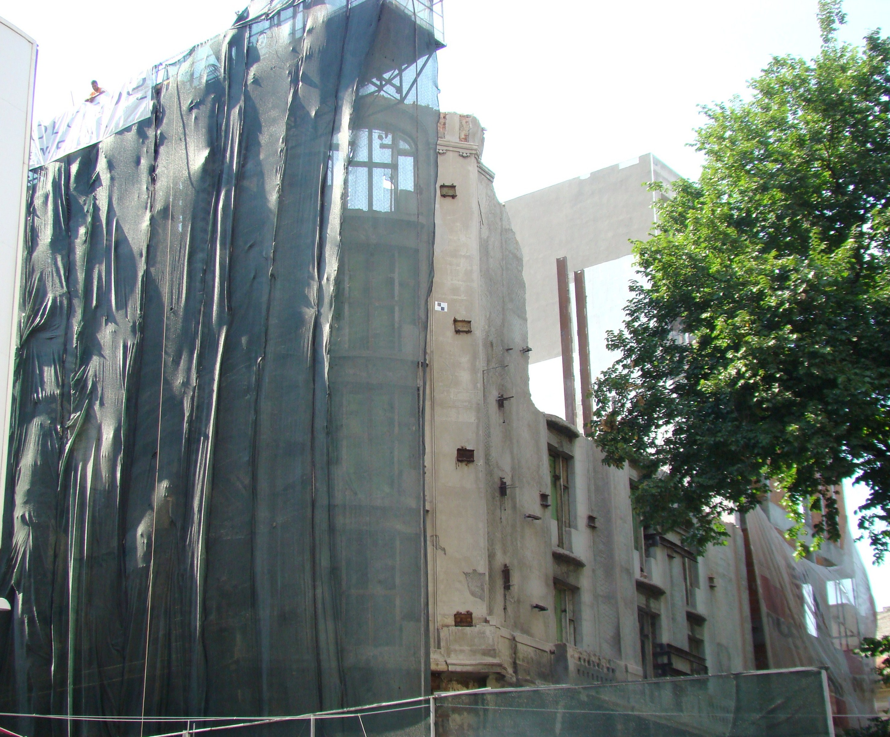 Casă monument istoric, str. Ion Câmpineanu, nr.2